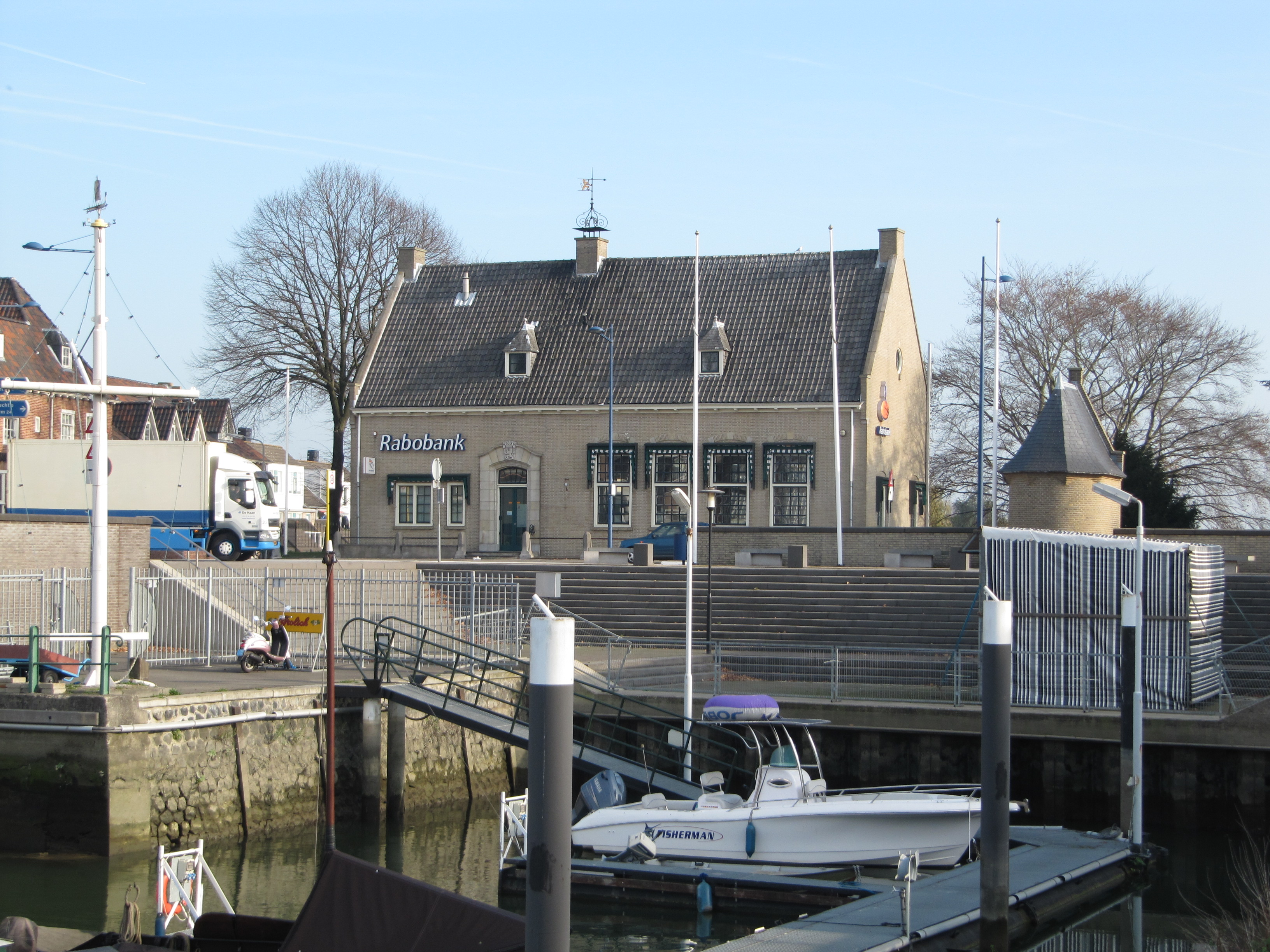 Alblasserdam, haven en dam, Rabobank, voormalig (of nieuw gebouwd) polderhuis, Dam 65